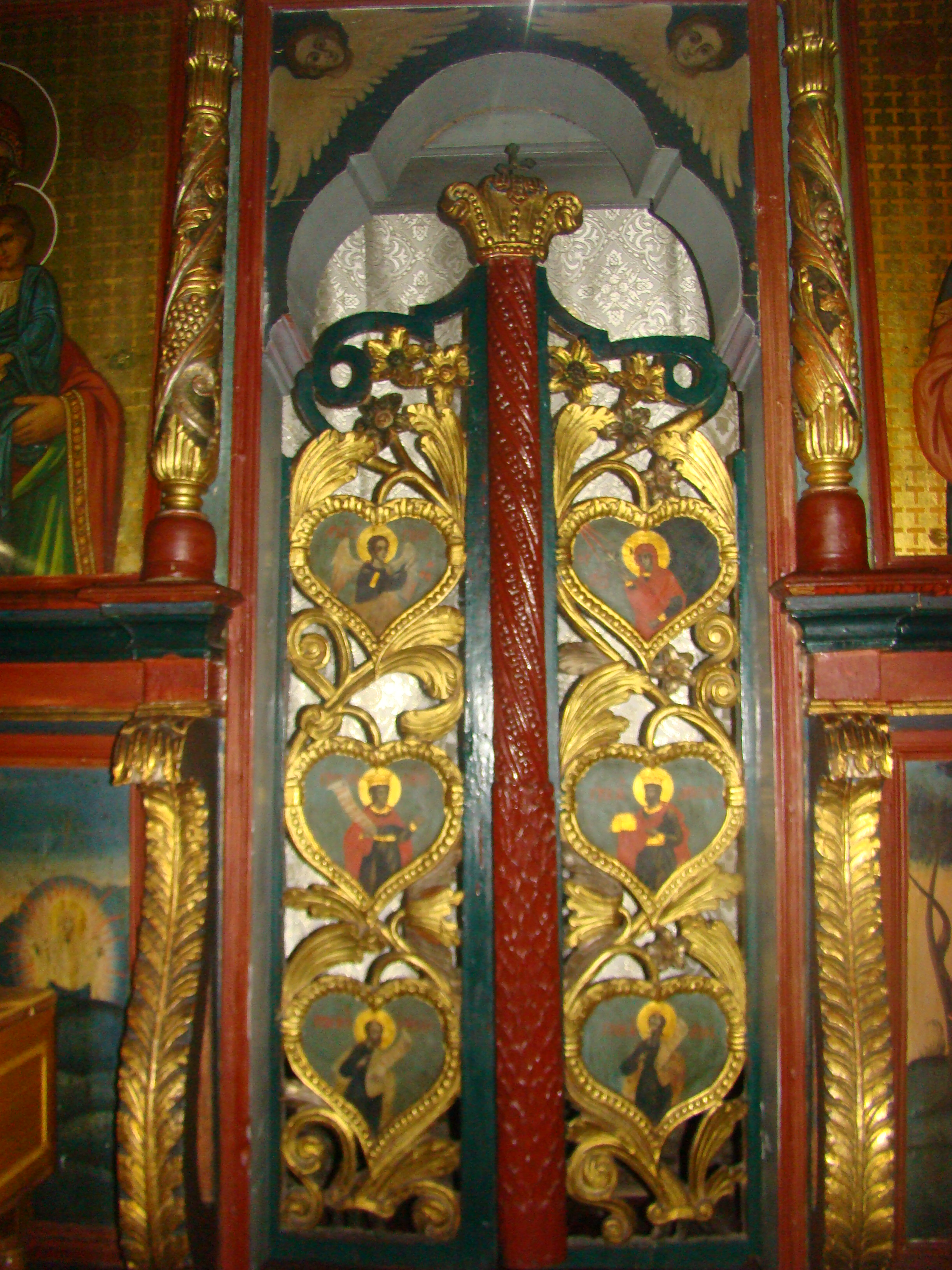 Schitul Valea Neagră, Vrancea